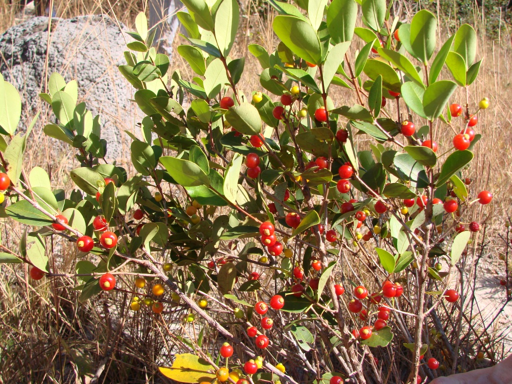 Eugenia punicifolia - MYRTACEAE Reserva Extrativista de Recanto das Araras de Terra Ronca - São Domingos - Goiás - Brasil.